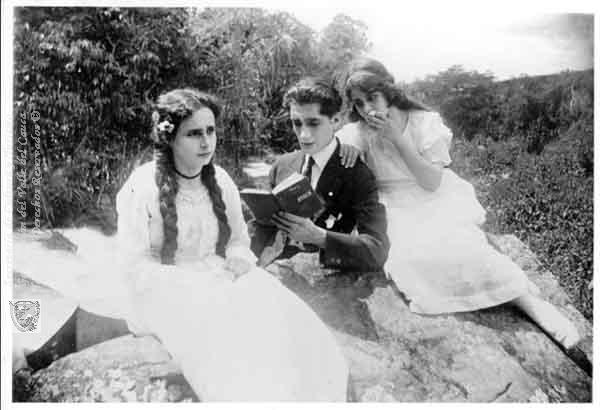 Escena de la primera versión cinematográfica de "María" basada en la obra de Jorge Isaacs. En la fotografía los actores Sinisterra Gómez y López Pomareda. Hacienda El Paraiso, El Cerrito. Santiago de Cali, C. 1930